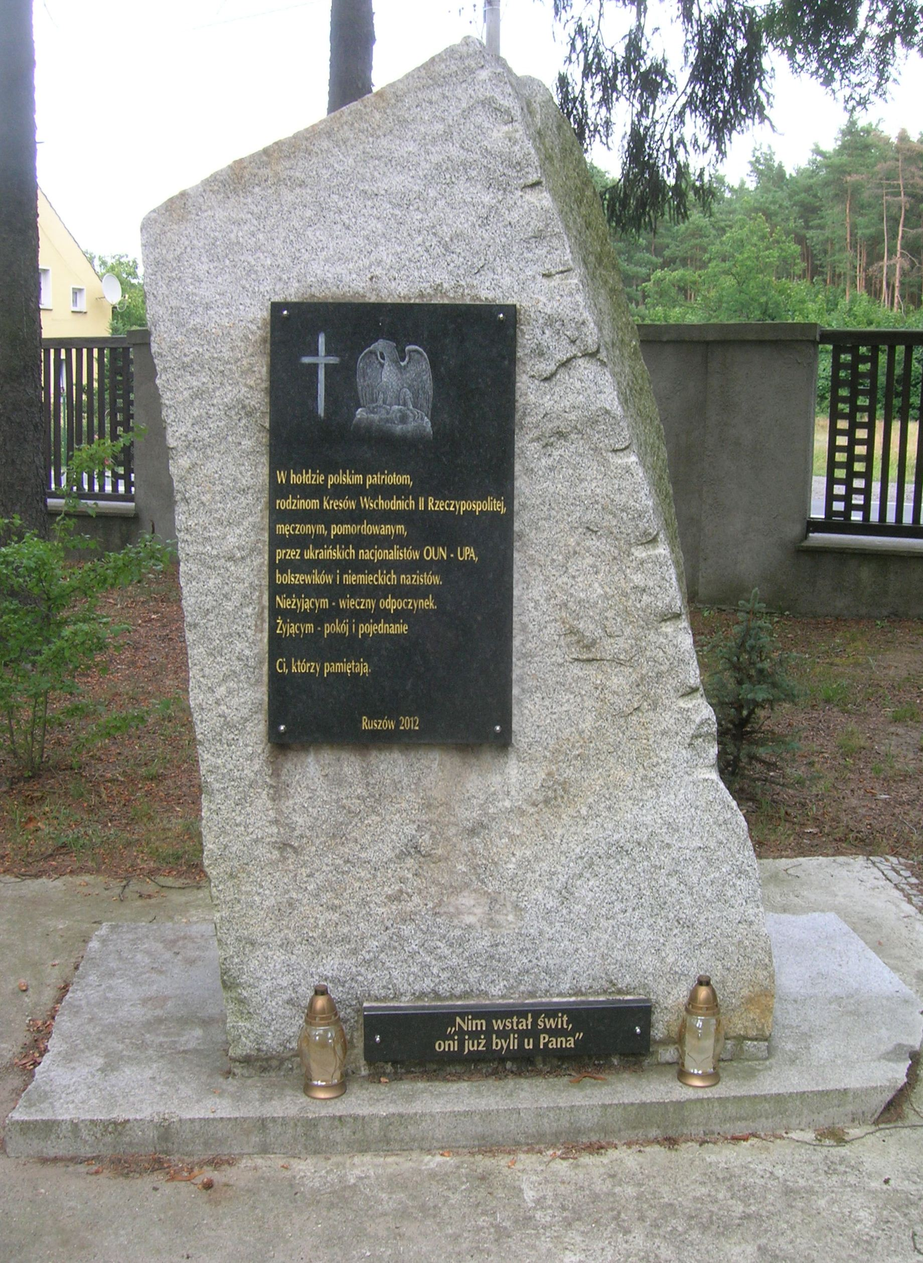 Pomnik polskich ofiar na Kresach Wschodnich w Ruszowie